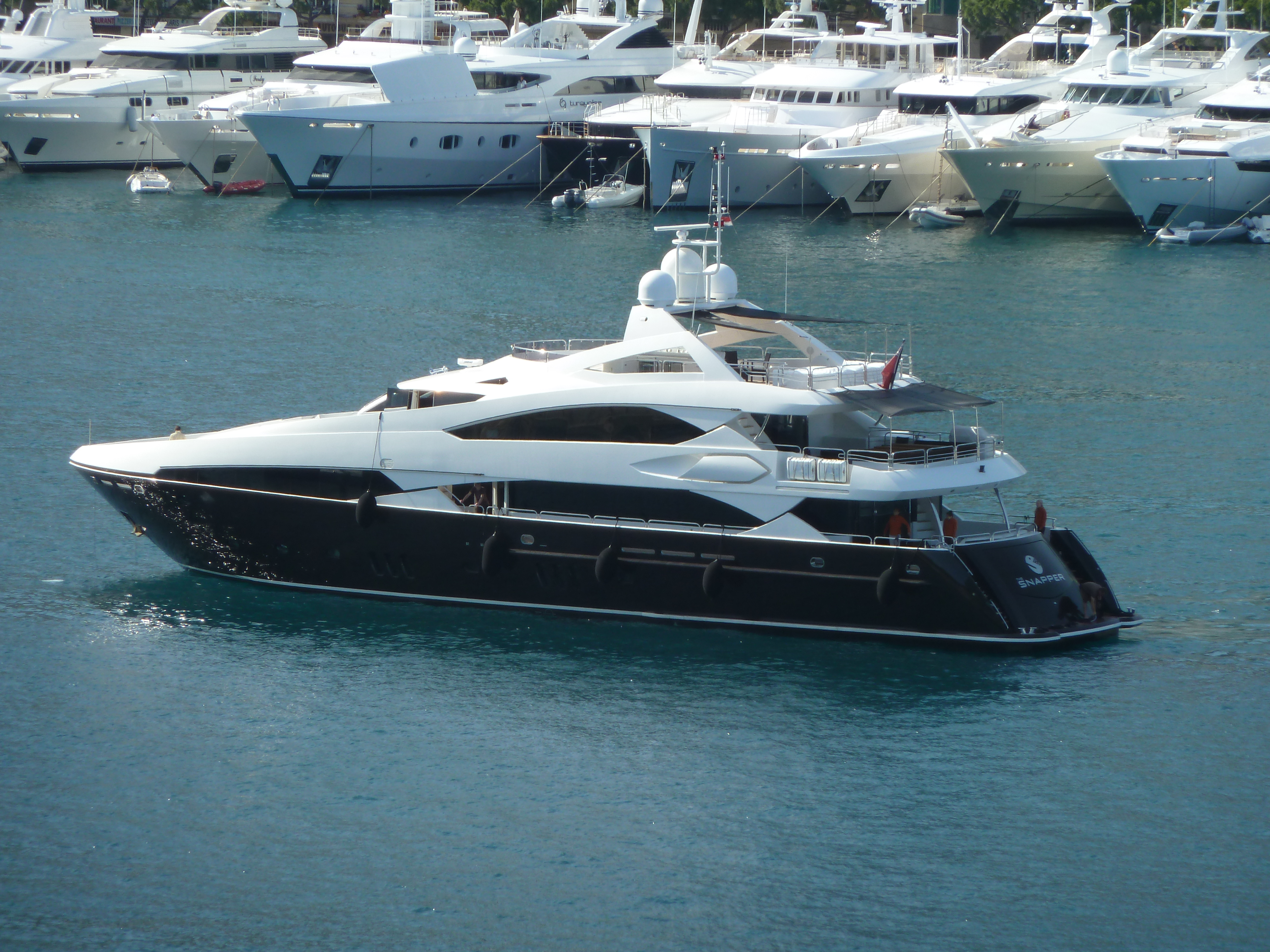 The Snapper à Monaco